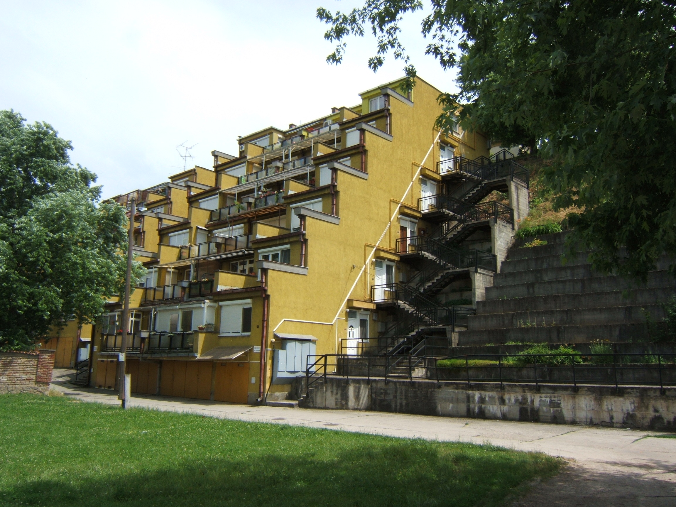 A donneri teraszház